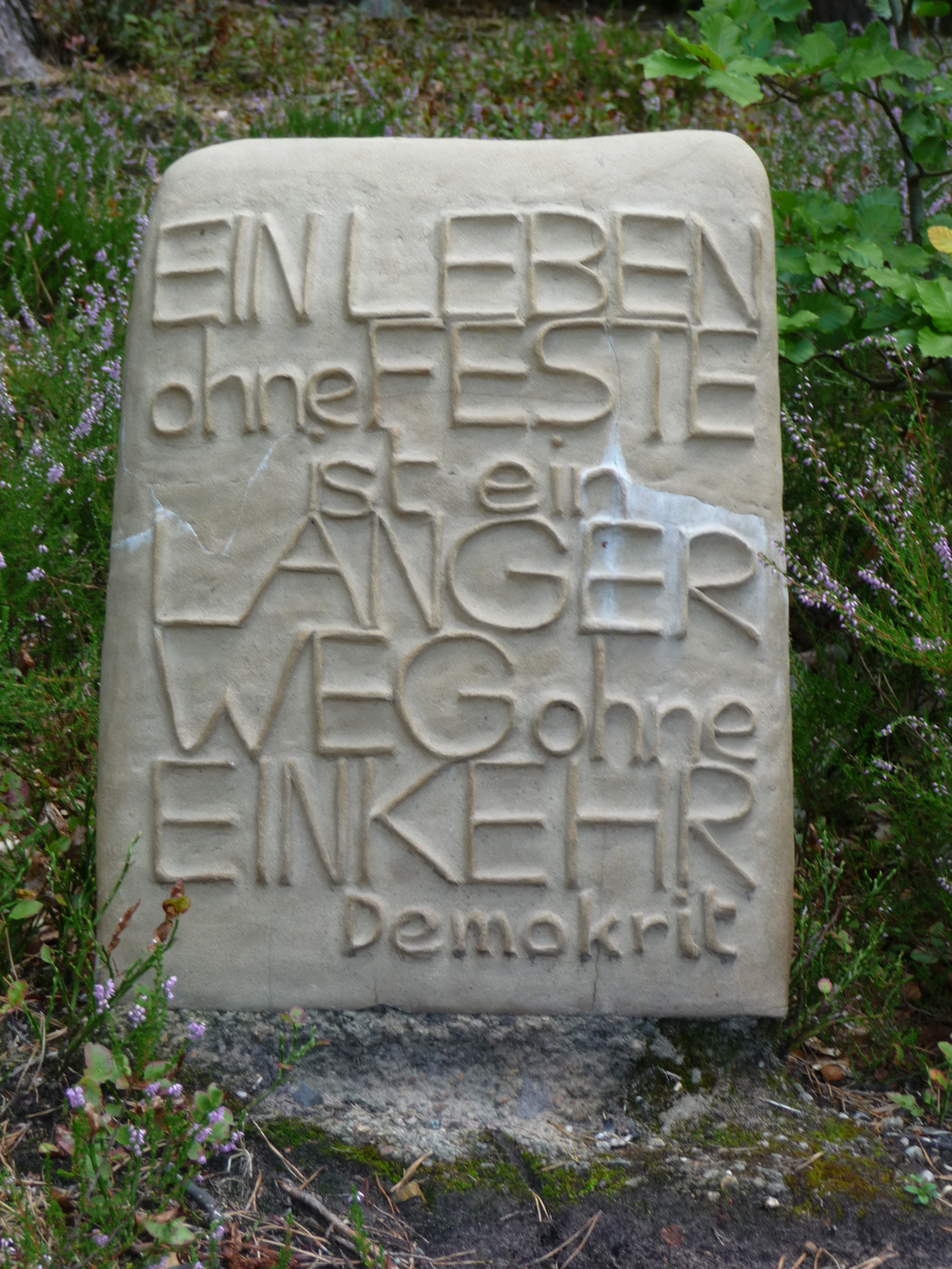 Die Stationen des 4,5 km langen Rundweges Lebenspfad Alsenborn orientieren sich an vorhandene Elemente in der Natur und sind jeweils mit einem Text gestaltet, der Situationen und Stationen menschlichen Lebens in den Blick nimmt.